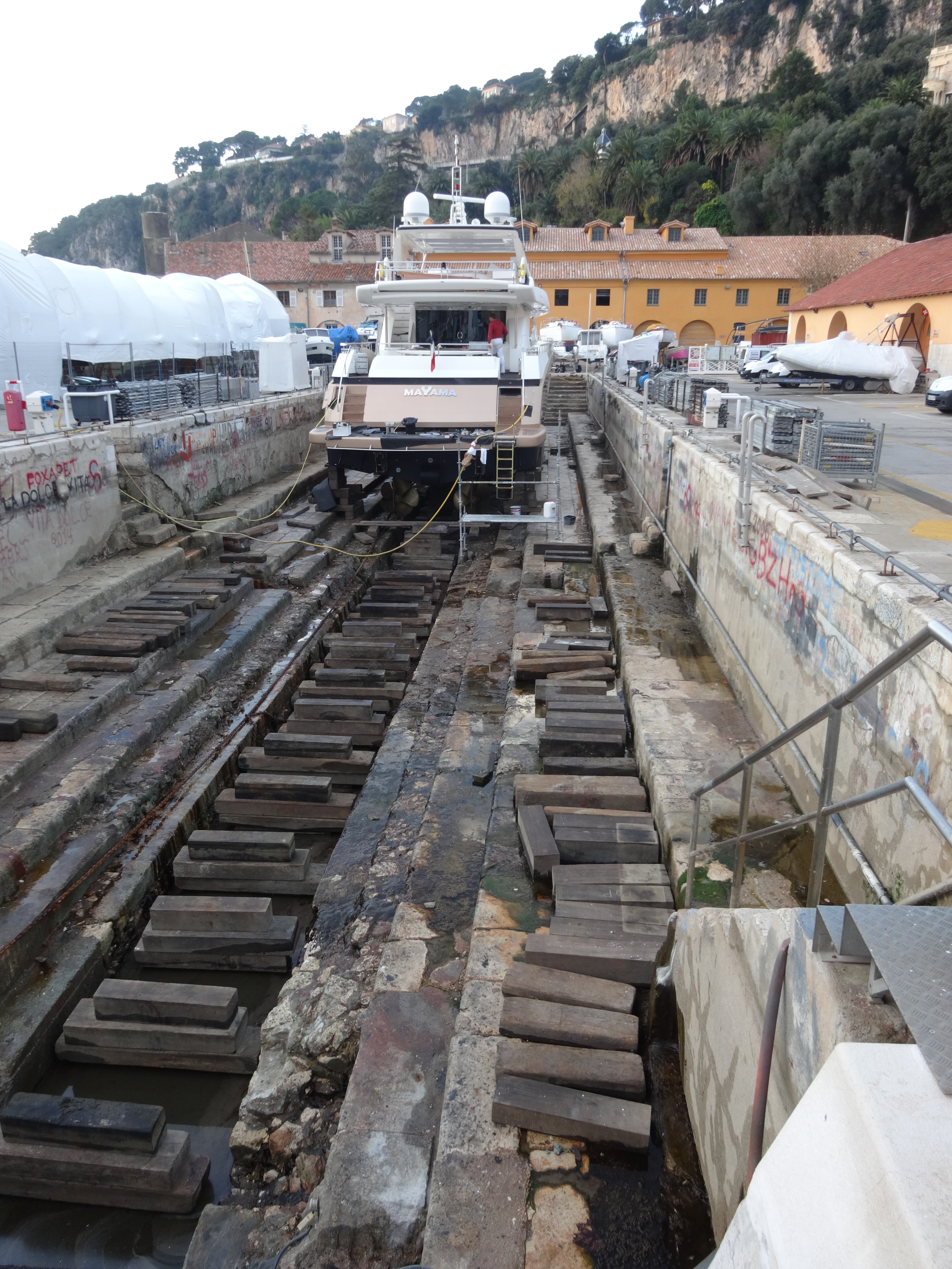 Bassin de radoub de la darse de Villefranche-sur-Mer, Alpes-Maritimes, France